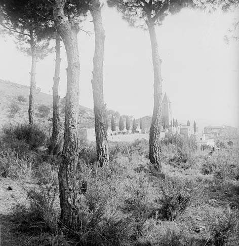 Imatge